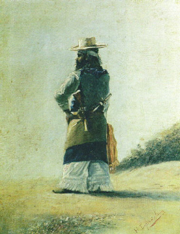 Obra del pintor uruguayo Horacio Espondaburu (1855-1902) “Gaucho”, óleo sobre tela de 36,5 x 28,5 cm.